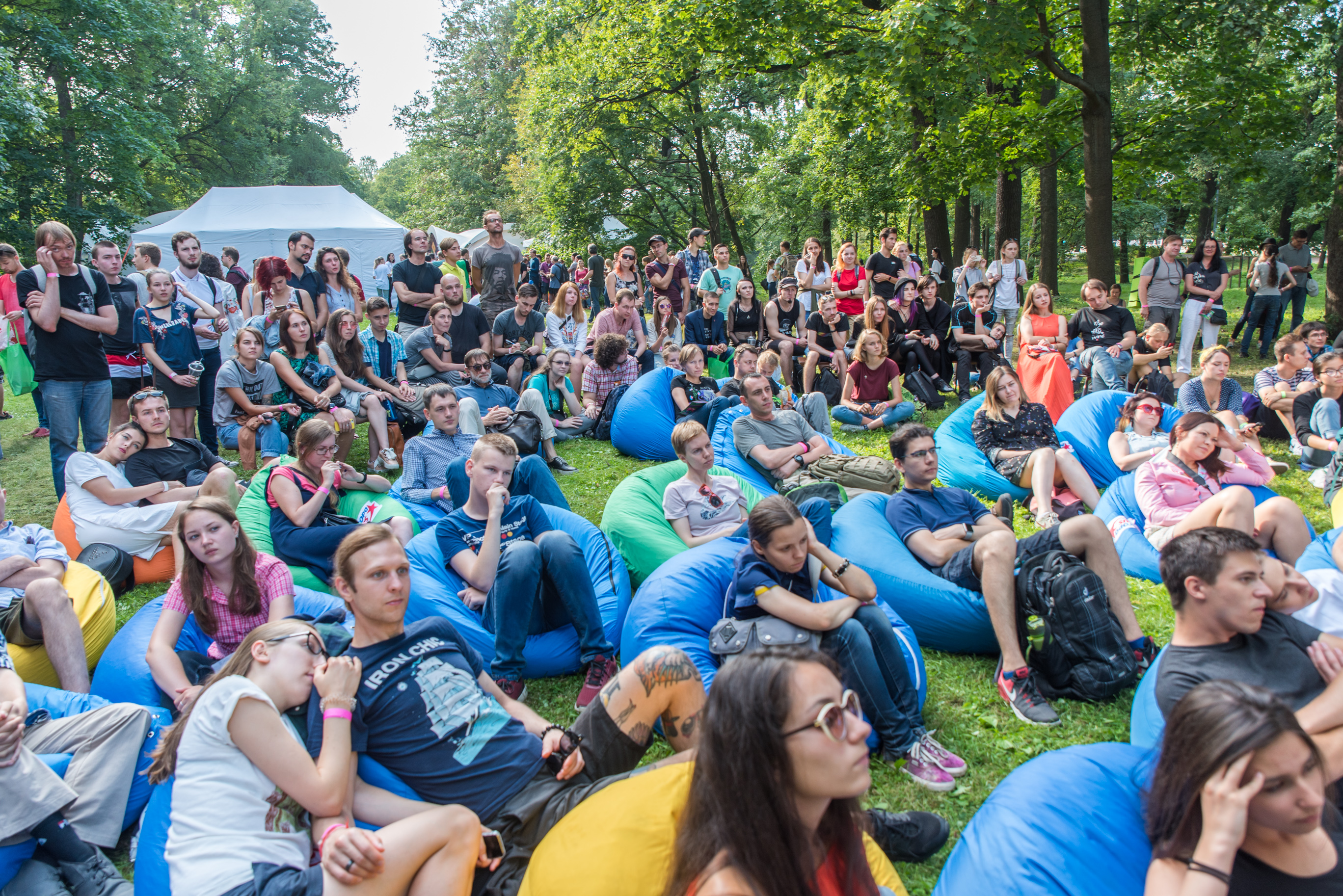 Зрители лектория Cosmos на Geek Picnic 2018 в Санкт-Петербурге